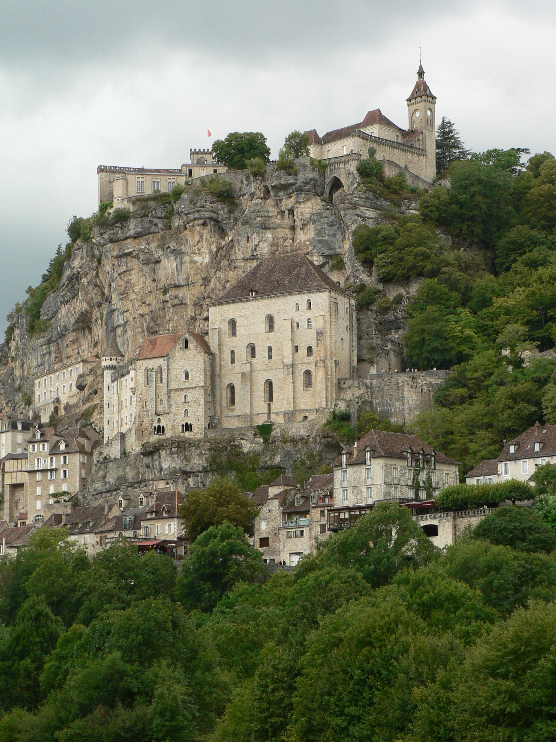 Rocamadour (France) vue générale par temps gris